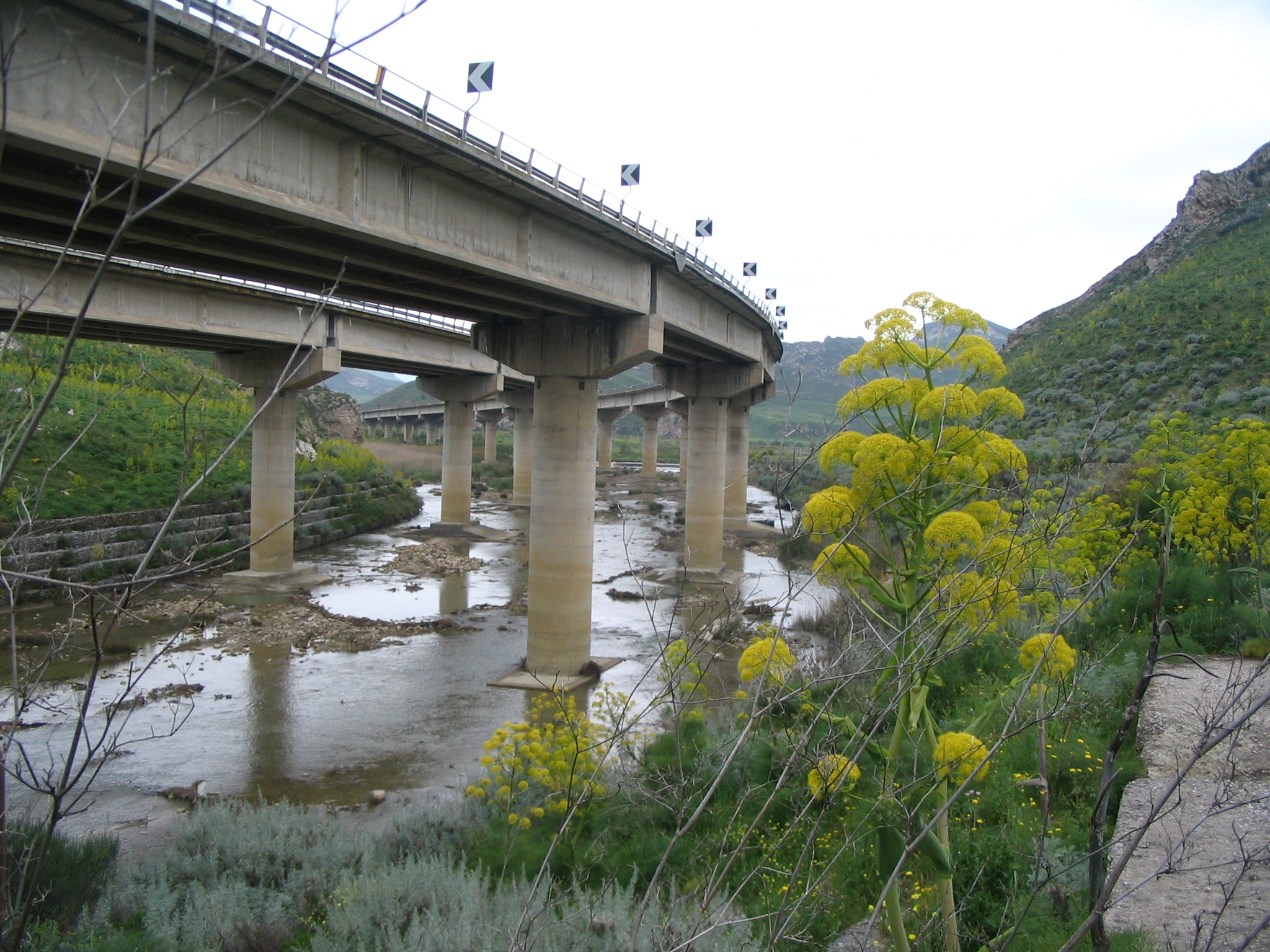 Autostrada A19 à Ponte Cinque Archi, Santa Caterina Villarmosa